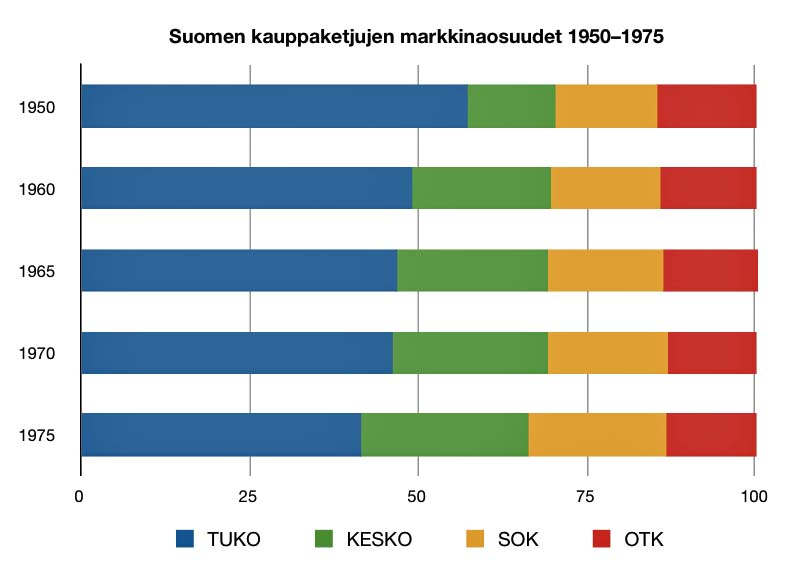 Suomalaisten kaupan ryhmittymien markkinaosuudet 1950–1975. Lähde: Calonius, Henrik. Kedjebildningarna i finländsk distribution. Struktur och utvecklingstendenser. 3. painos. Åbo 1976. Sivu 19.